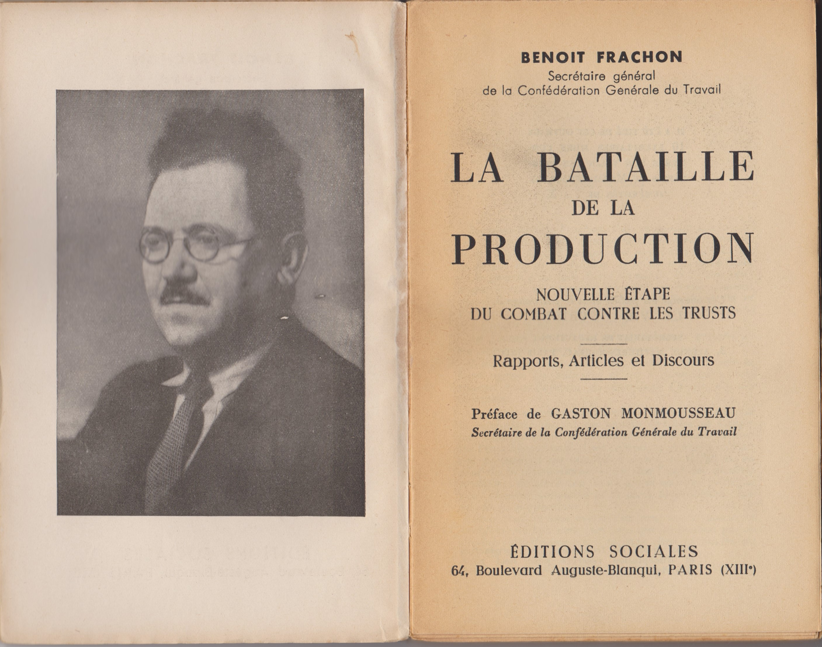 Page titre du livre et photo de Benoît Frachon.